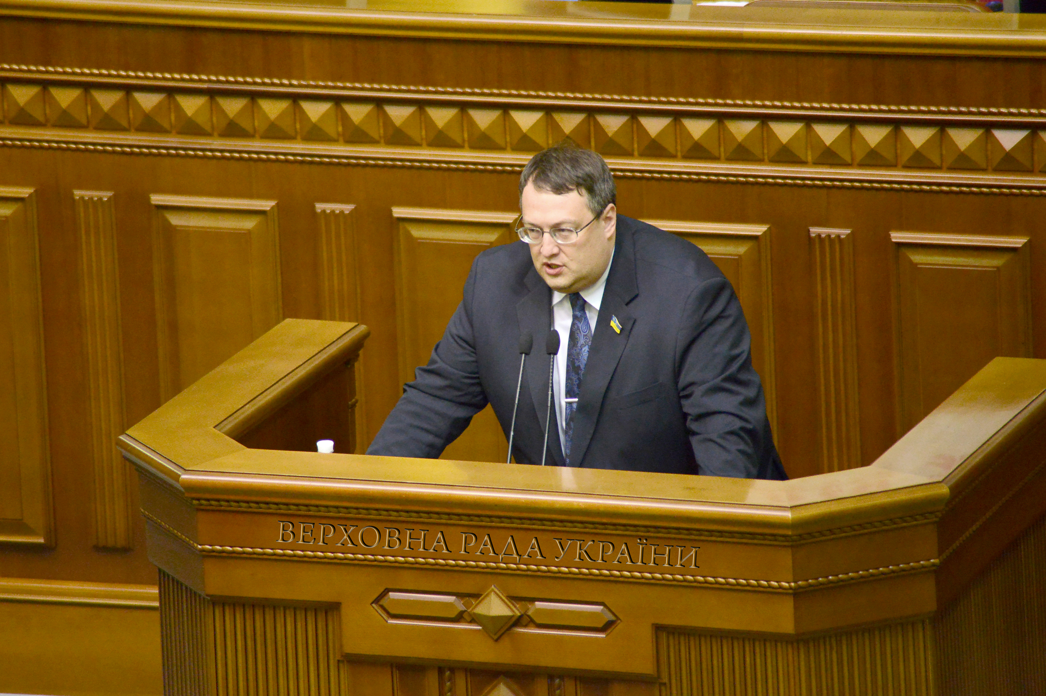 ВЕРХОВНА РАДА УКРАЇНИ 2015 фотограф Вадим Чуприна